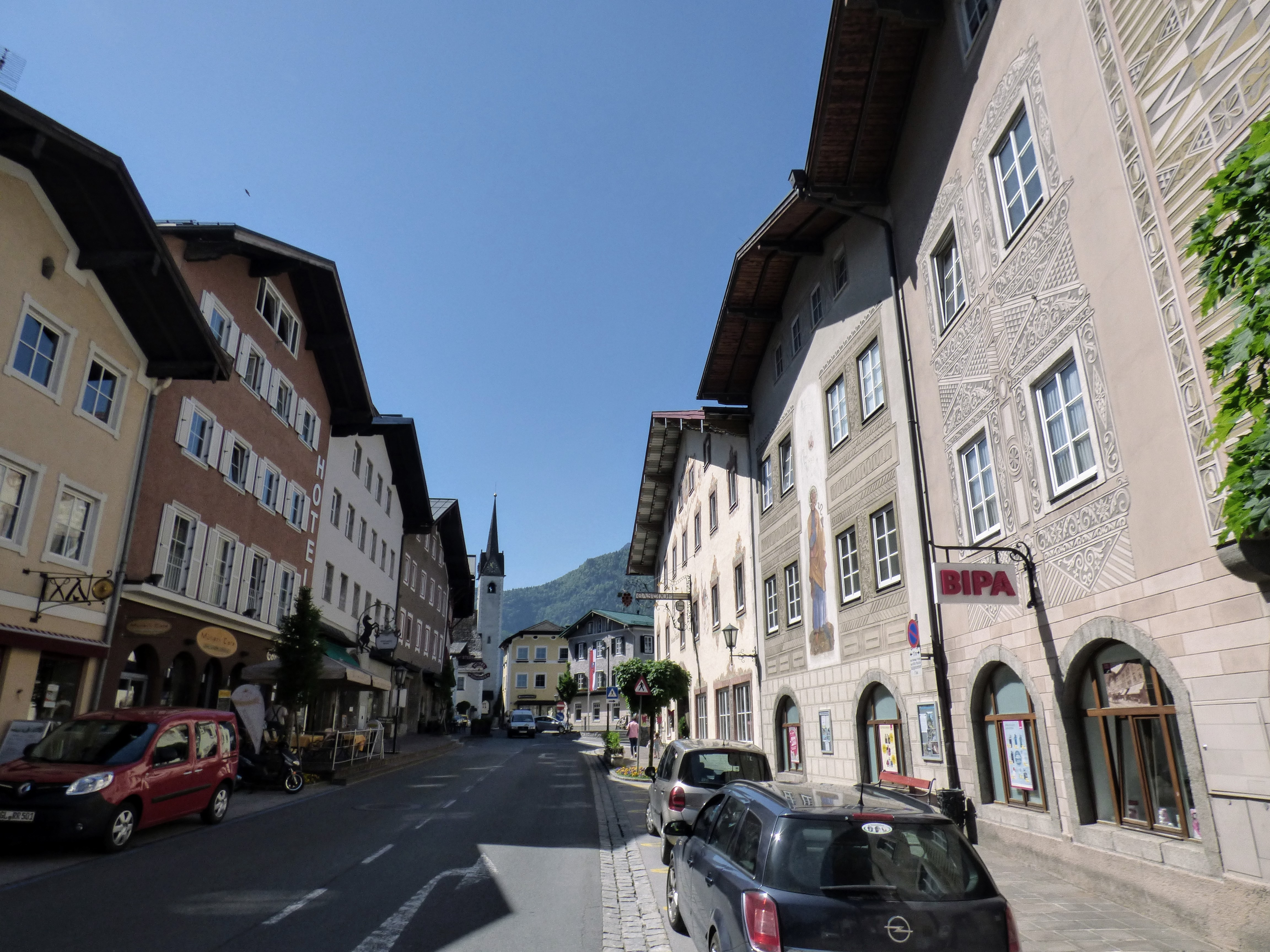 Ortszentrum Golling an der Salzach, mit Pfarrkirche Golling